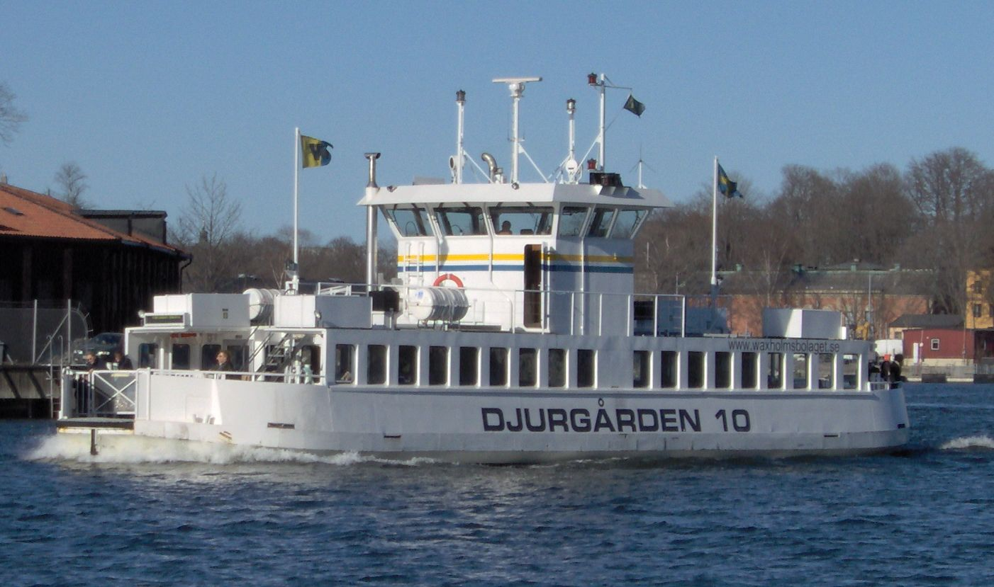 Djurgårdsfärja utanför Kastellholmen i Stockholm. 2005.